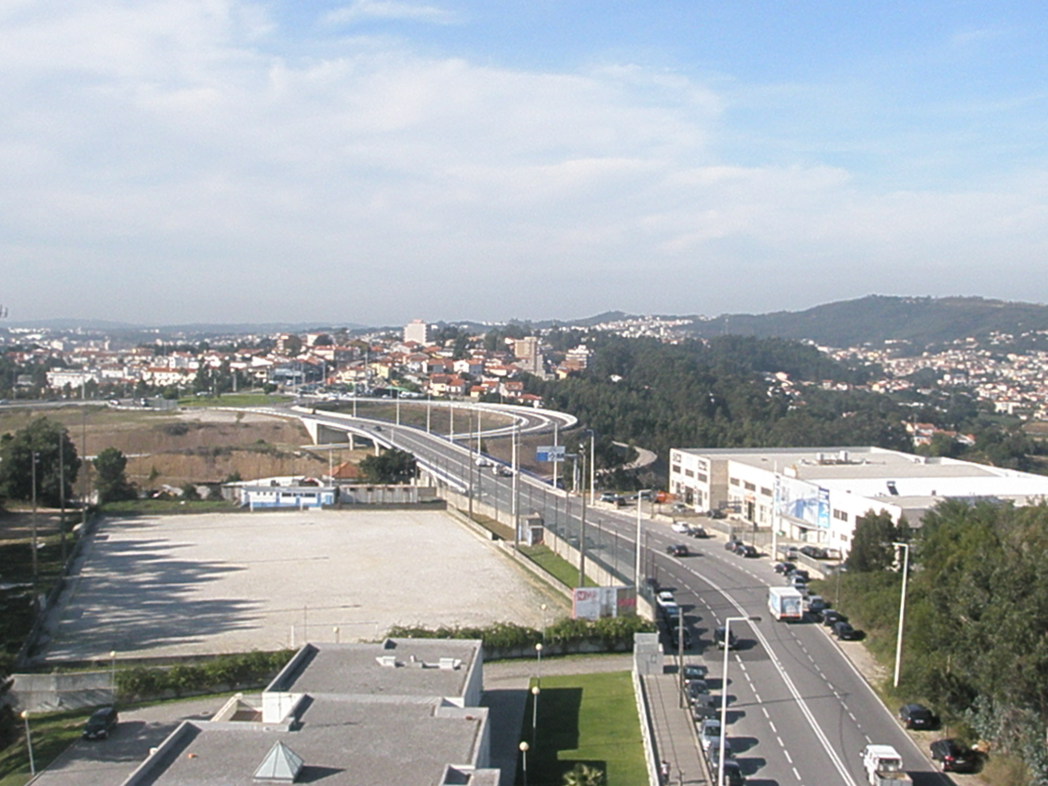 S.Pedro da cova